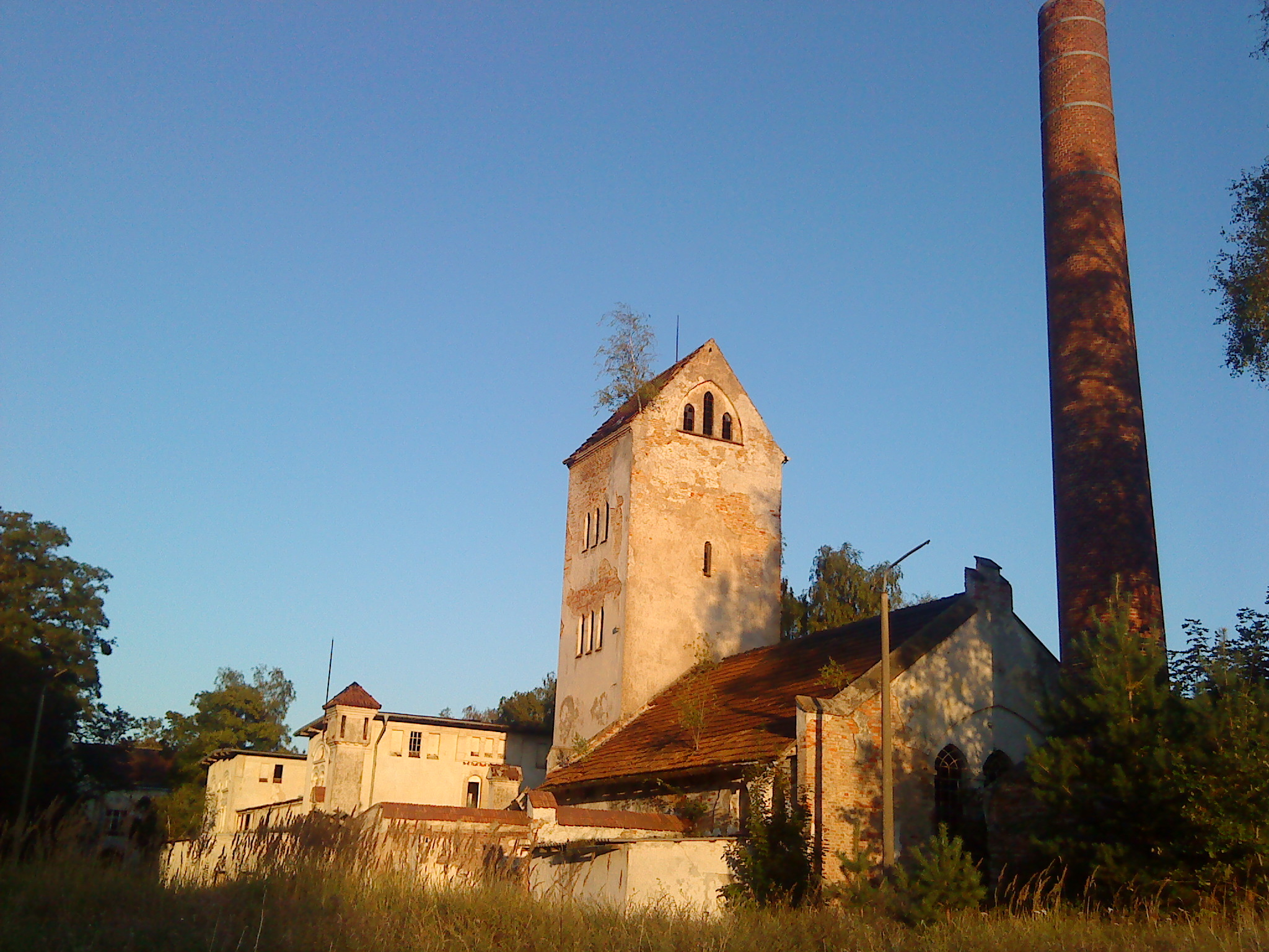 Landesanstalt Strelitz